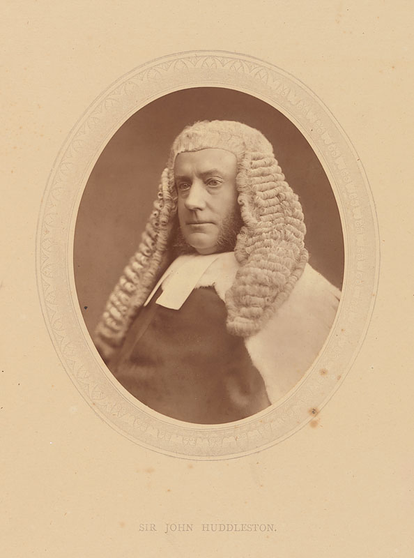 Sir John Walter Huddleston (1815-1890)